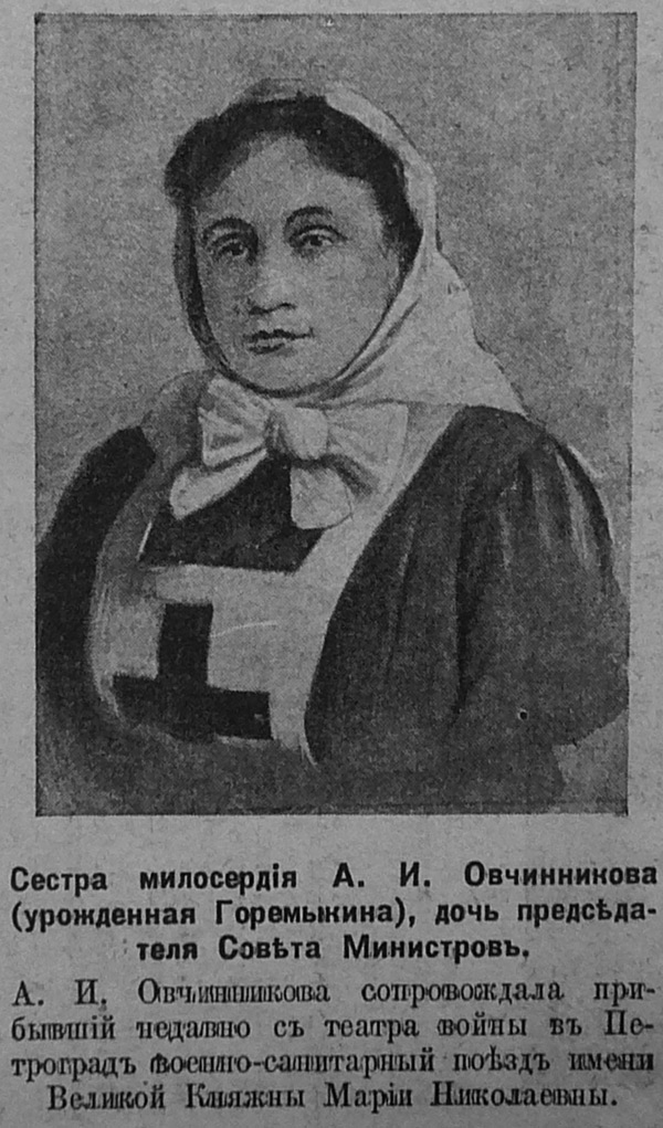 Дочь Ивана Горемыкина